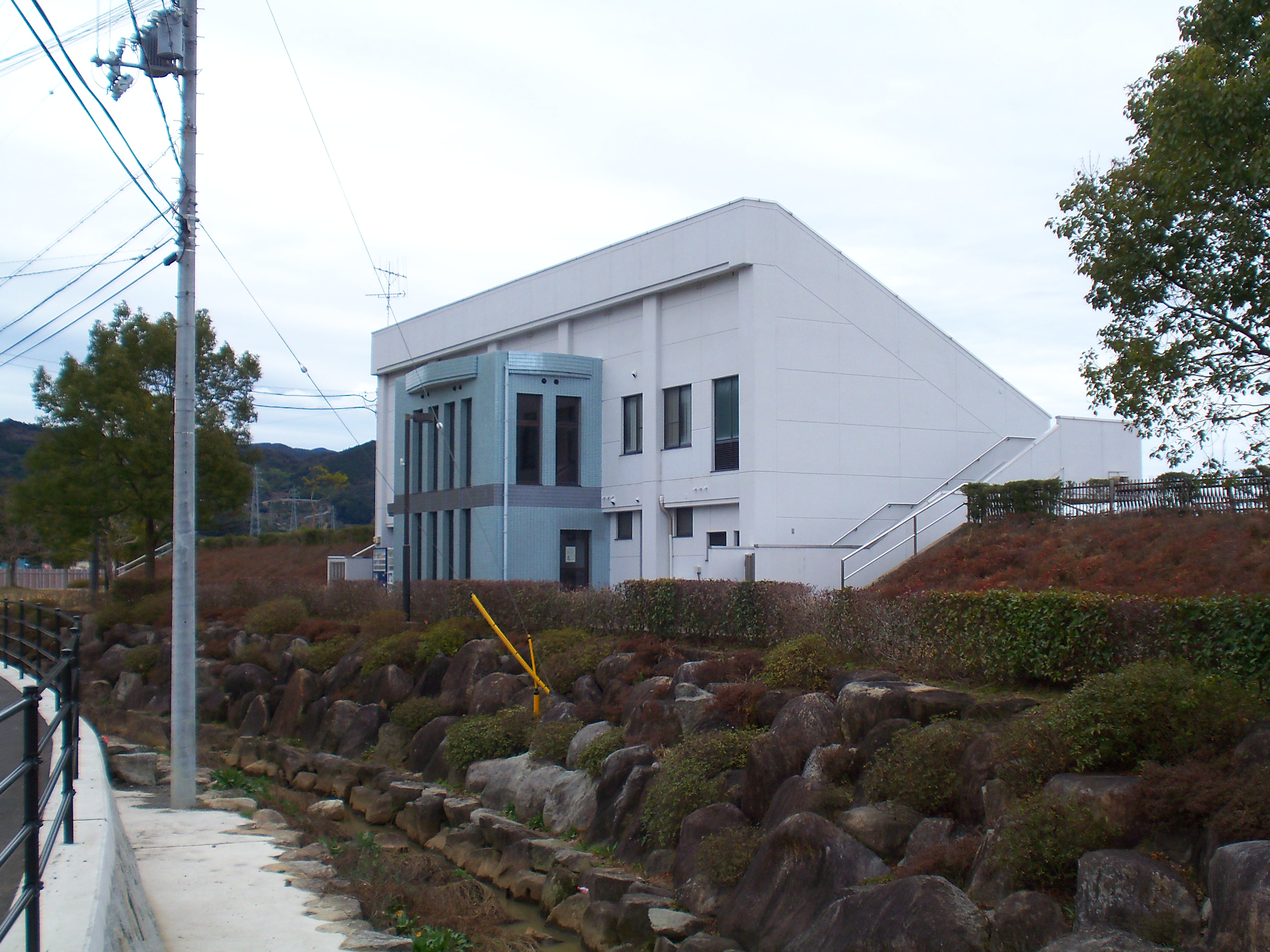 三重県熊野市有馬町の山崎運動公園多目的グラウンド。